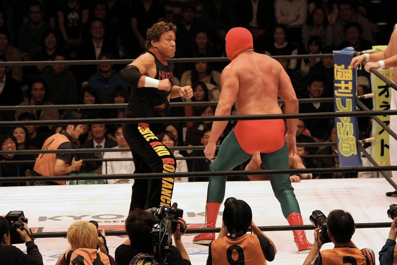 HUSTLE